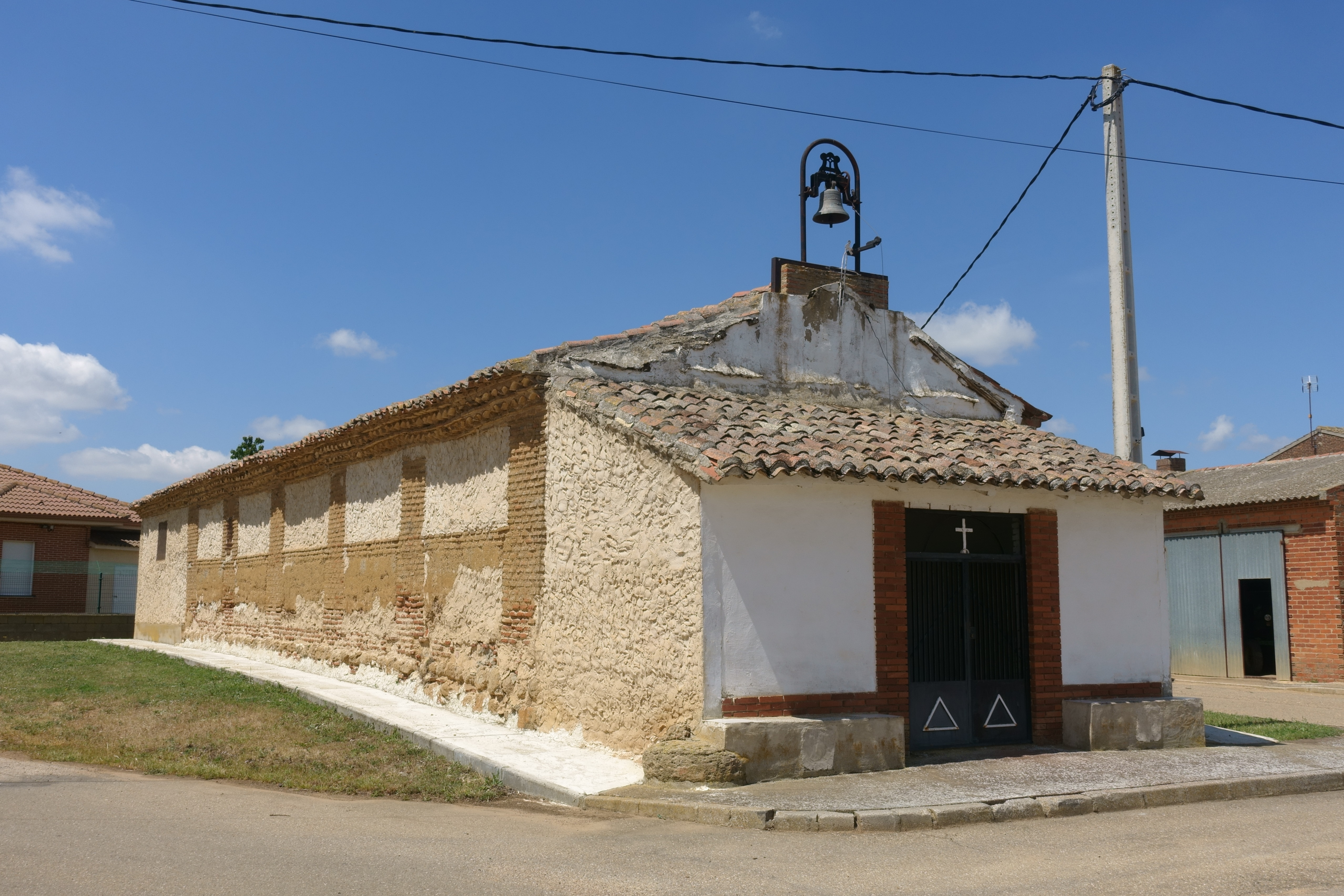 Ermita del Humilladero, Joarilla de las Matas (León, España).